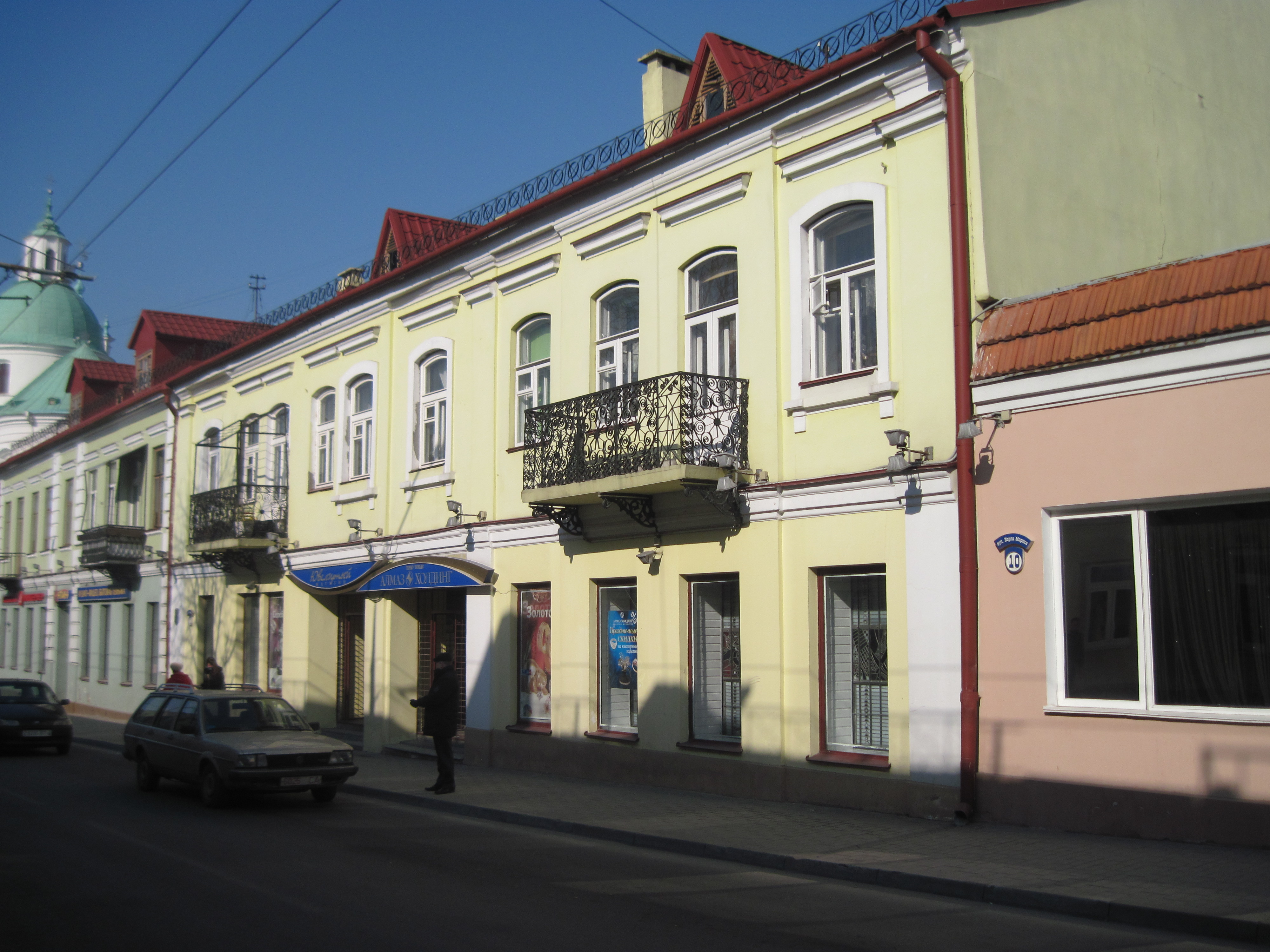 Забудова гістарычнага цэнтра Гродна. Вуліца К. Маркса, 8